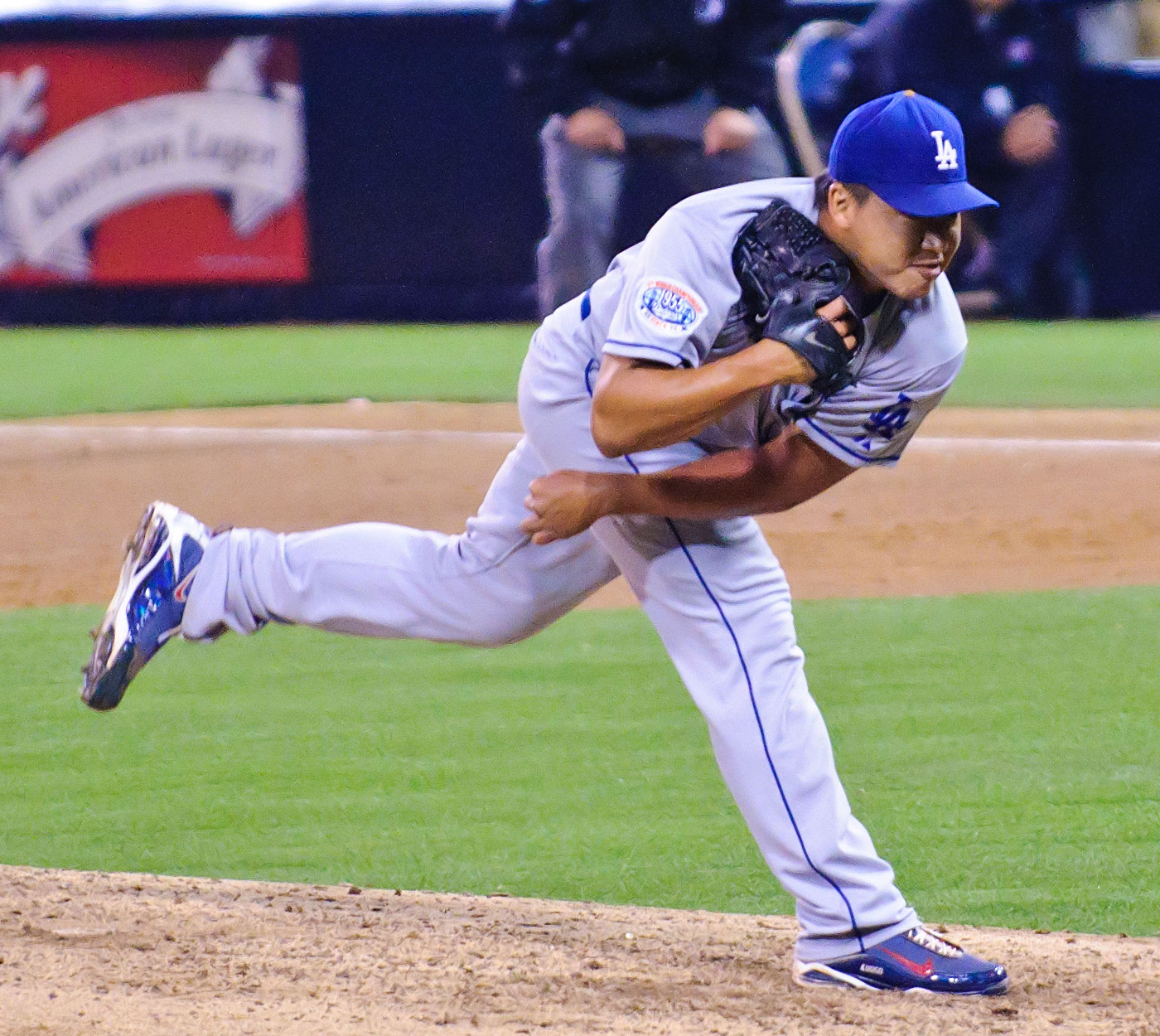 Hong-Chih Kuo